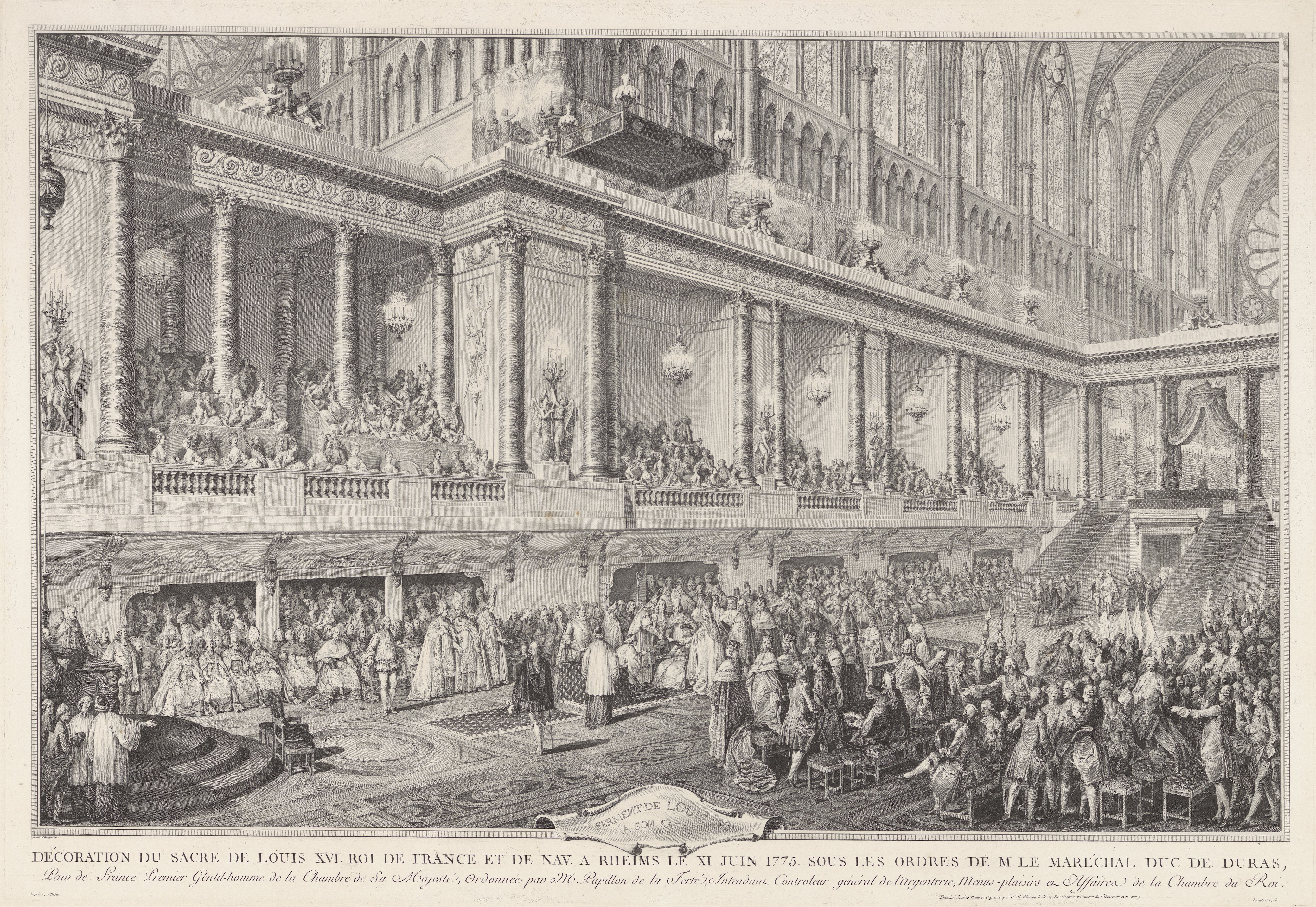 IdentificatieTitel(s): Verlossing van de zielL'AmeObjecttype: prent Objectnummer: RP-P-1970-258Catalogusreferentie: IFF après 1800 11Opschriften / Merken: verzamelaarsmerk, verso, gestempeld: Lugt 2228verzamelaarsmerk, verso, gestempeld: Lugt 2760nummer, recto, gestempeld: ‘23’VervaardigingVervaardiger: prentmaker: Adrien Didier (vermeld op object)naar schilderij van: Pierre Prud'hon (vermeld op object)drukker: Alfred Salmon (vermeld op object)Plaats vervaardiging: ParijsDatering: 1874Materiaal: papier chine collé Techniek: etsen / graveren (drukprocedé)Afmetingen: plaatrand: h 330 mm × b 248 mmOnderwerpWat: the soul travellingsnakesVerwerving en rechtenCredit line: Aankoop uit het F.G. Waller-FondsVerwerving: aankoop 1970Copyright: Publiek domein